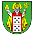 Herb gminy Dominowo.